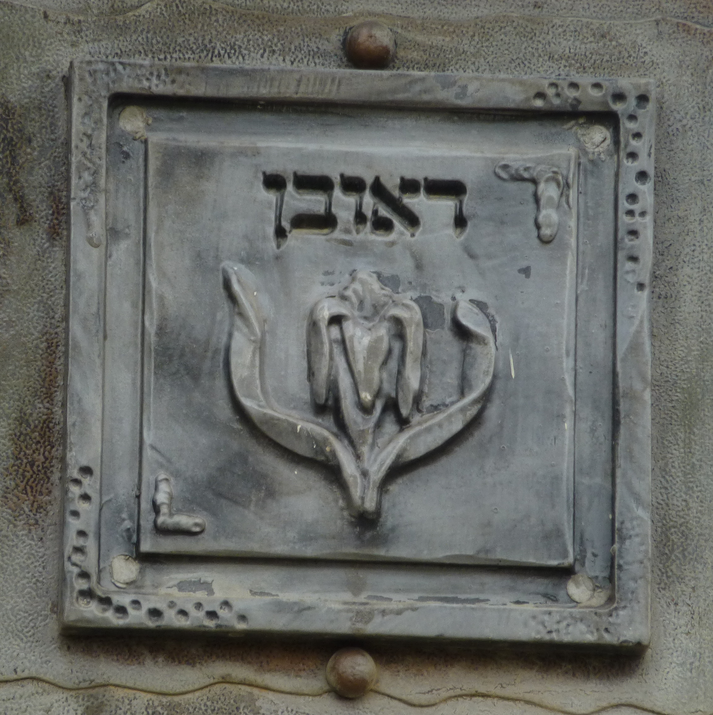 בית הכנסת הגדול "אוהל שרה" - בית הכנסת הראשון של רחובות, נבנה בשנת תרס"ד? ובהמשך שופץ והורחב והיה למוקד הקהילתי והחברתי של המושבה הצעירה.